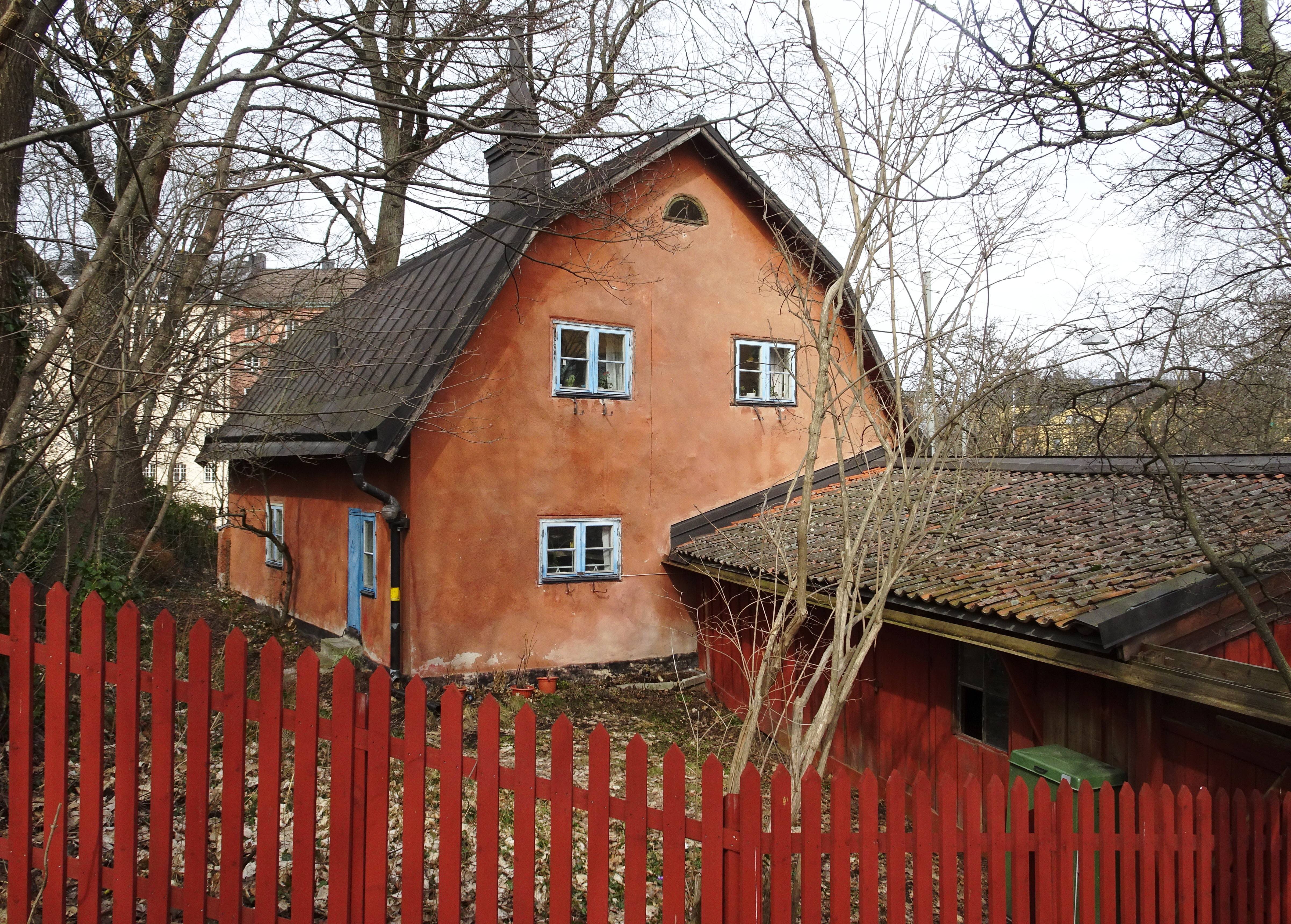 Fastigheten Grindvakten 1, Södermalm, ursprungligen tjänstebostad för portvakten vid malmgården Heleneborg.